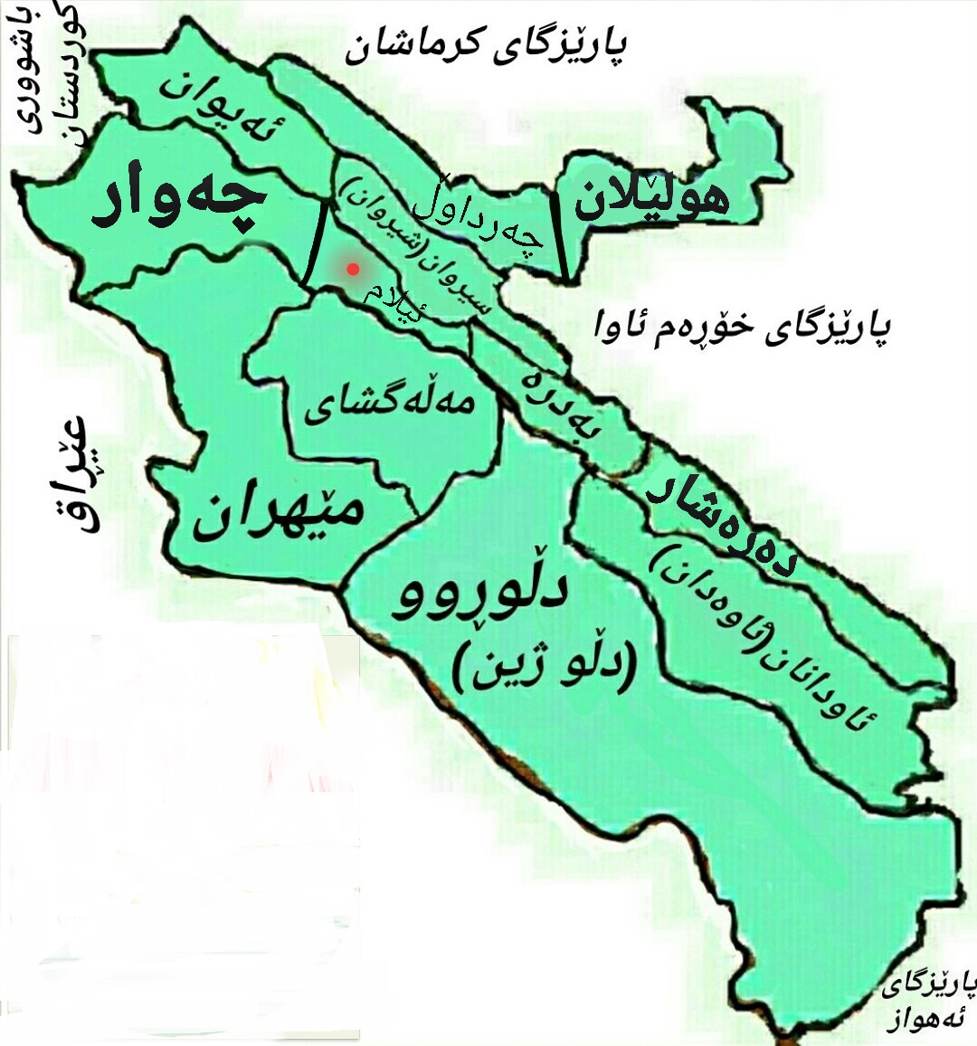 کوردی: ئیلام